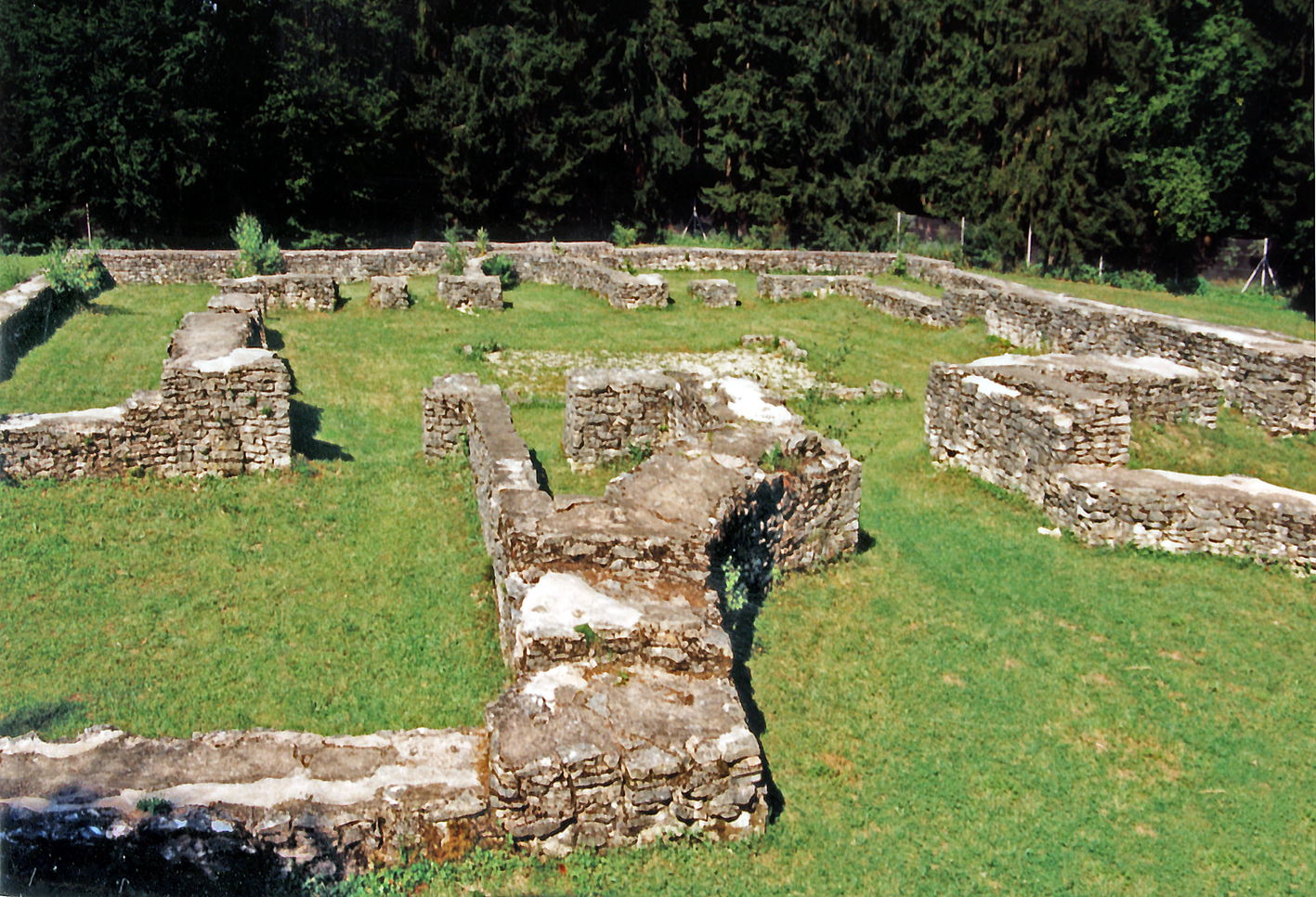 Blick über das Kleinkastell „In der Harlach“ bei Burgsalach am rätischen Limes in Bayern, das zwischen 1916 und 1919 ergraben wurde. Die Anlage entstand höchstwarscheinlich um 215 n. Chr und wurde mit dem Limesfall 260 aufgegeben. Bei seiner Ausgrabung war das Mauerwerk teilweise noch bis zu 2 m hoch erhalten. Zustand im August 1991.